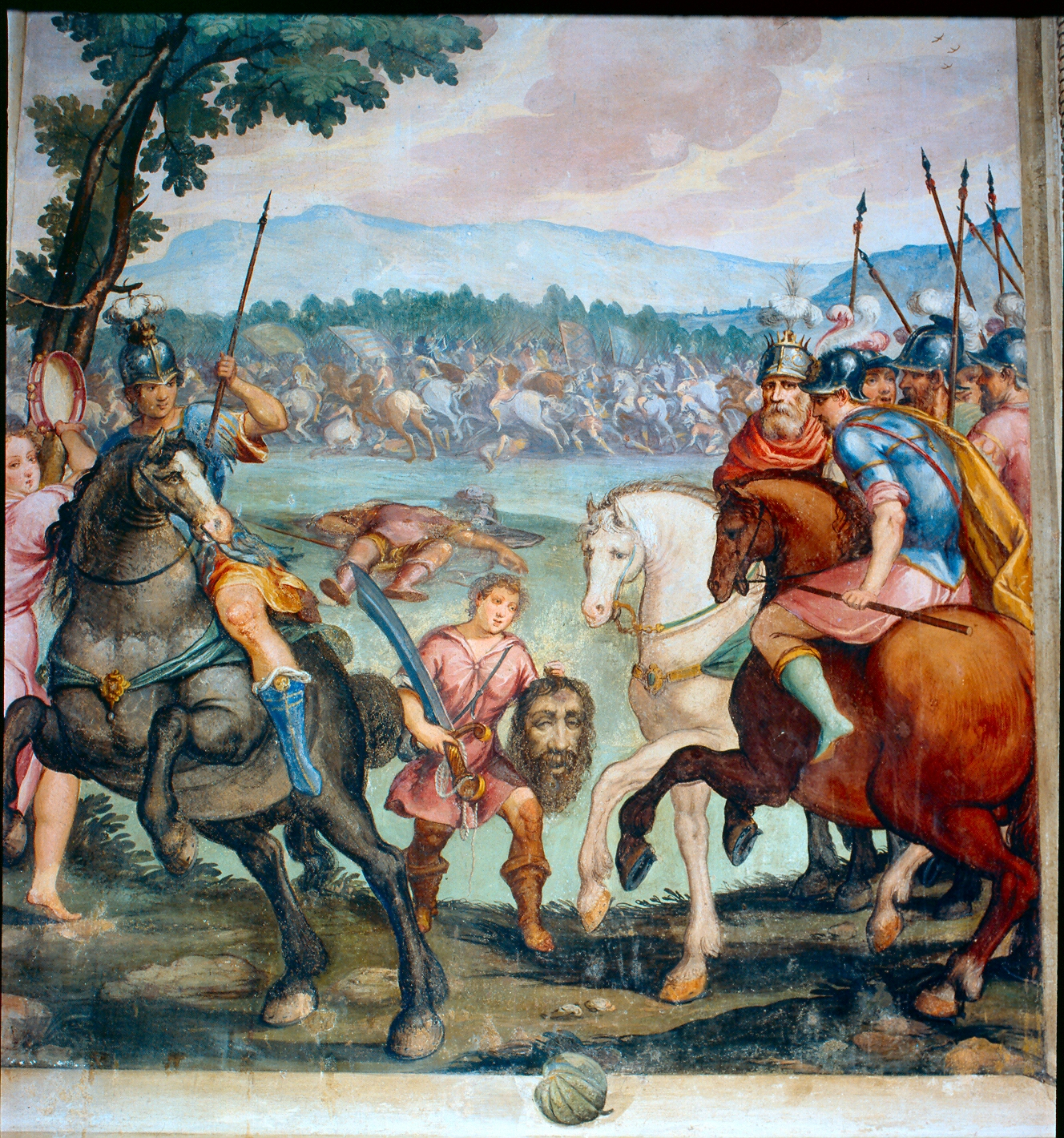 Davide e Golia David and Goliath